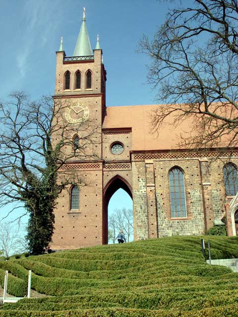 Müncheberg - Stadtpfarrkirche St. Marien